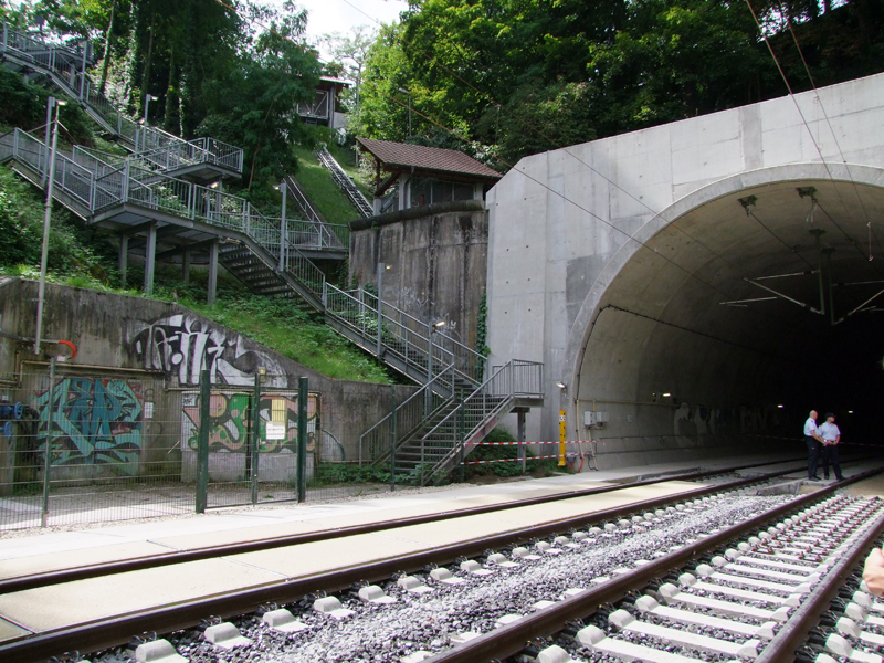 Alter Mainzer Eisenbahntunnel am Eisgrub-Einschnitt mit Rettungstreppe. Der Blick in den Tunnel geht Richtung Mainz Hauptbahnhof. Die Gleise sind zum Teil als Feste Fahrbahn und auf Schotter eingebaut. Foto wurde am "Tag des offenen Tunnels" aufgenommen.